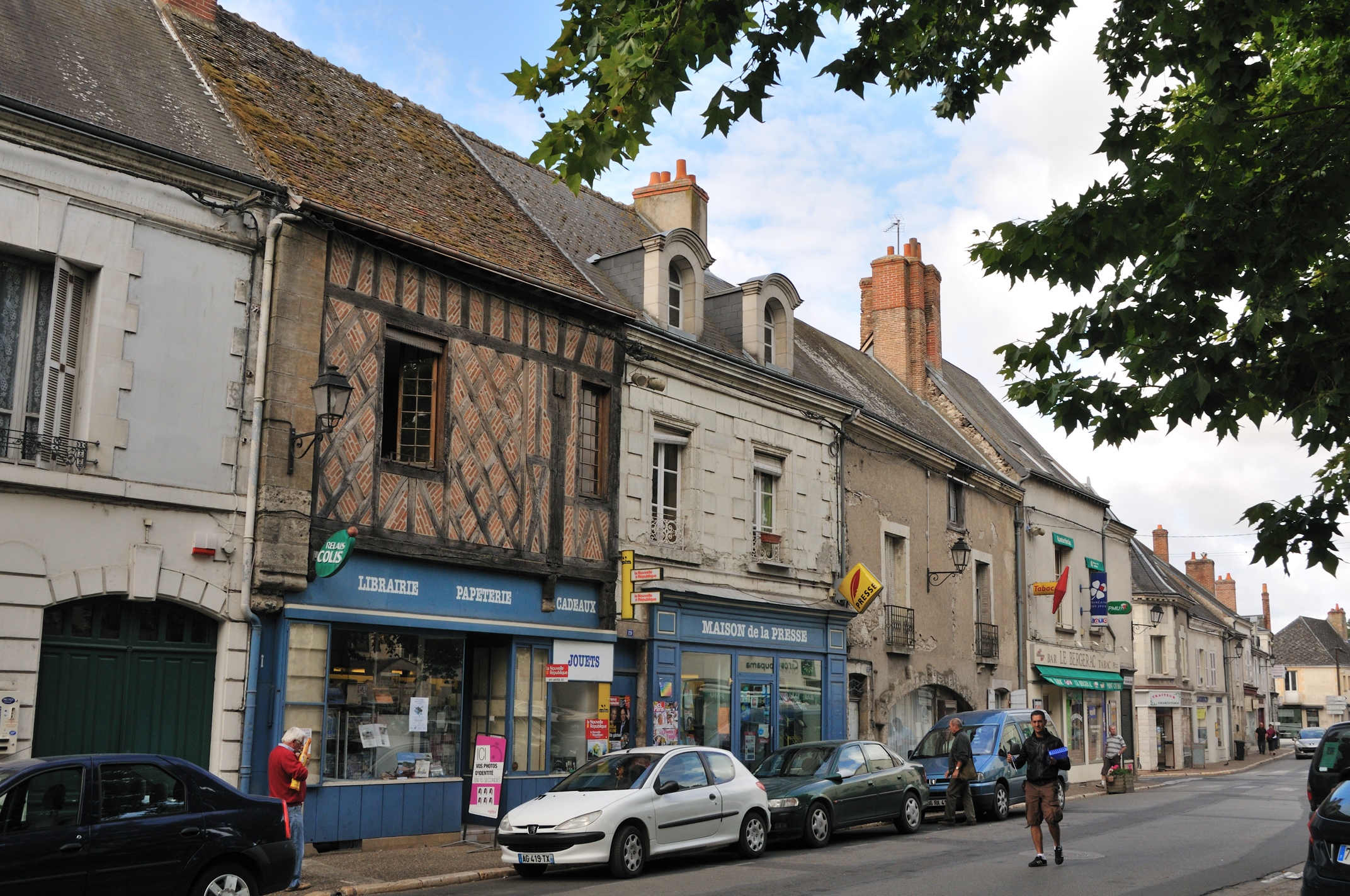 Grande Rue près de la place de l'Église, Onzain, Loir-et-Cher, France